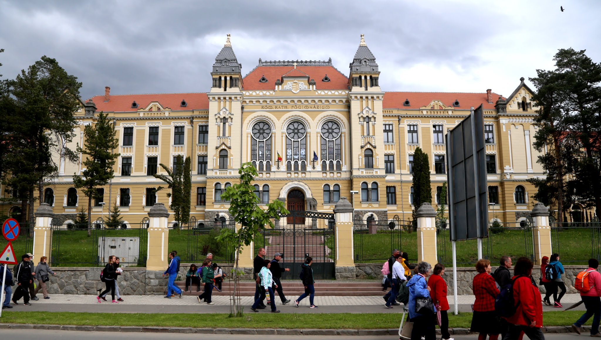 Csíksomlyói Márton Áron Gimnázium